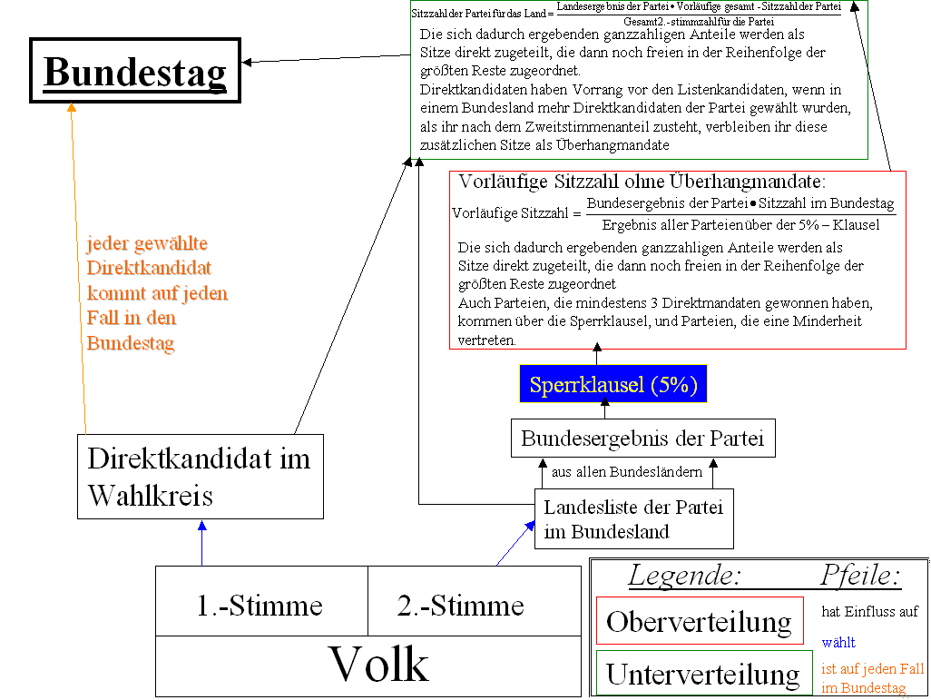 Wahlverfahren der BRD von 1987 bis 2005